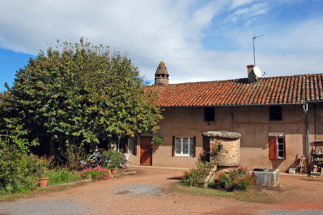 Ferme Coulas, Le Bourg (Inscrit, 1974)